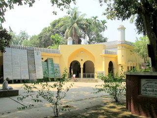 মাওলানা আবদুল হামিদ খান ভাসানীর মাজার